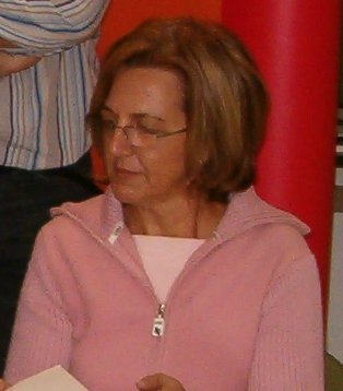 Joana Lluïsa Mascaró